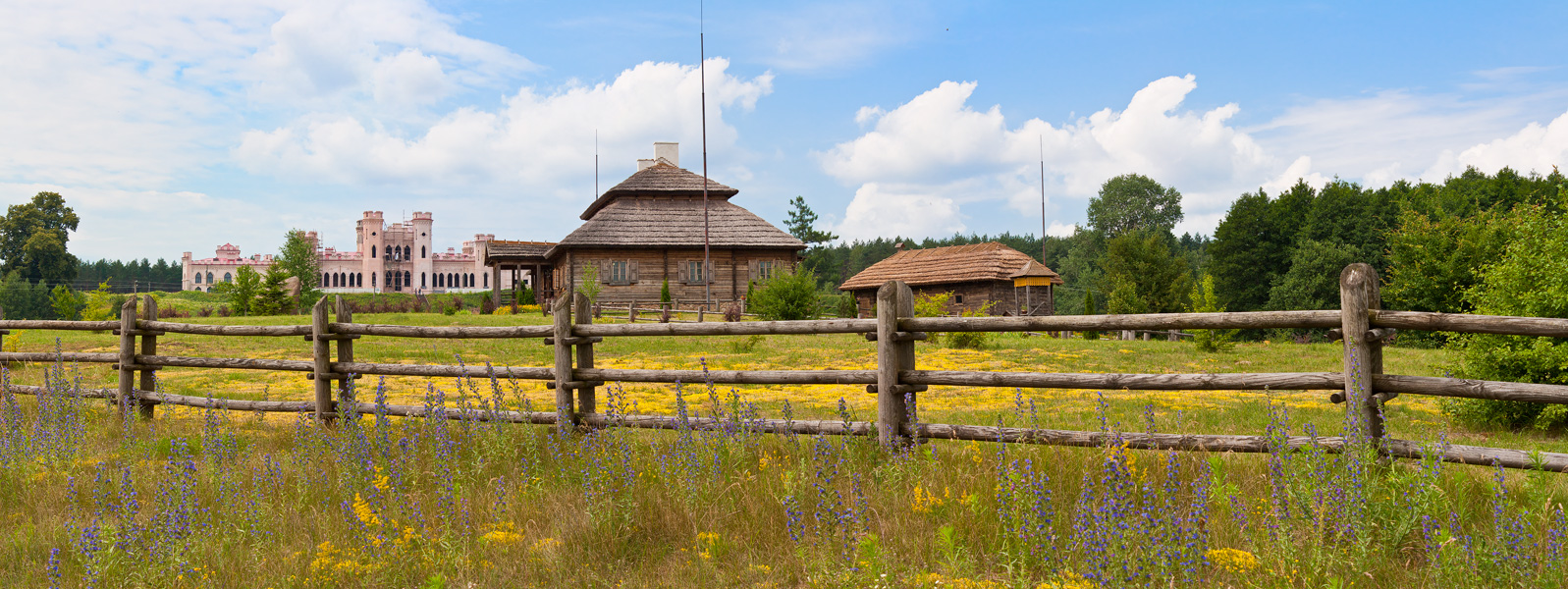 Беларуская (тарашкевіца): Косаўскі палацава-паркавы ансамбль: рэшткі былога палацу Пуслоўскіхмэмарыяльны музэй-сядзіба Т. Касьцюшкіфрагмэнты парку. г. Косава This is a photo of Belarusian heritage monument. Reference number: 111Г000305 ( WLM)